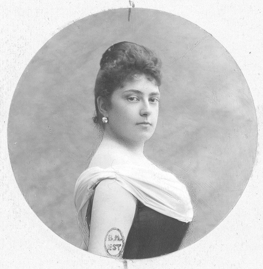 Portraits de Maria Letizia Bonaparte, duchesse d'Aoste (1866-1926), 2ème femme d'Amédée de Savoie, duc d'Aoste, ancien roi d'Espagne.